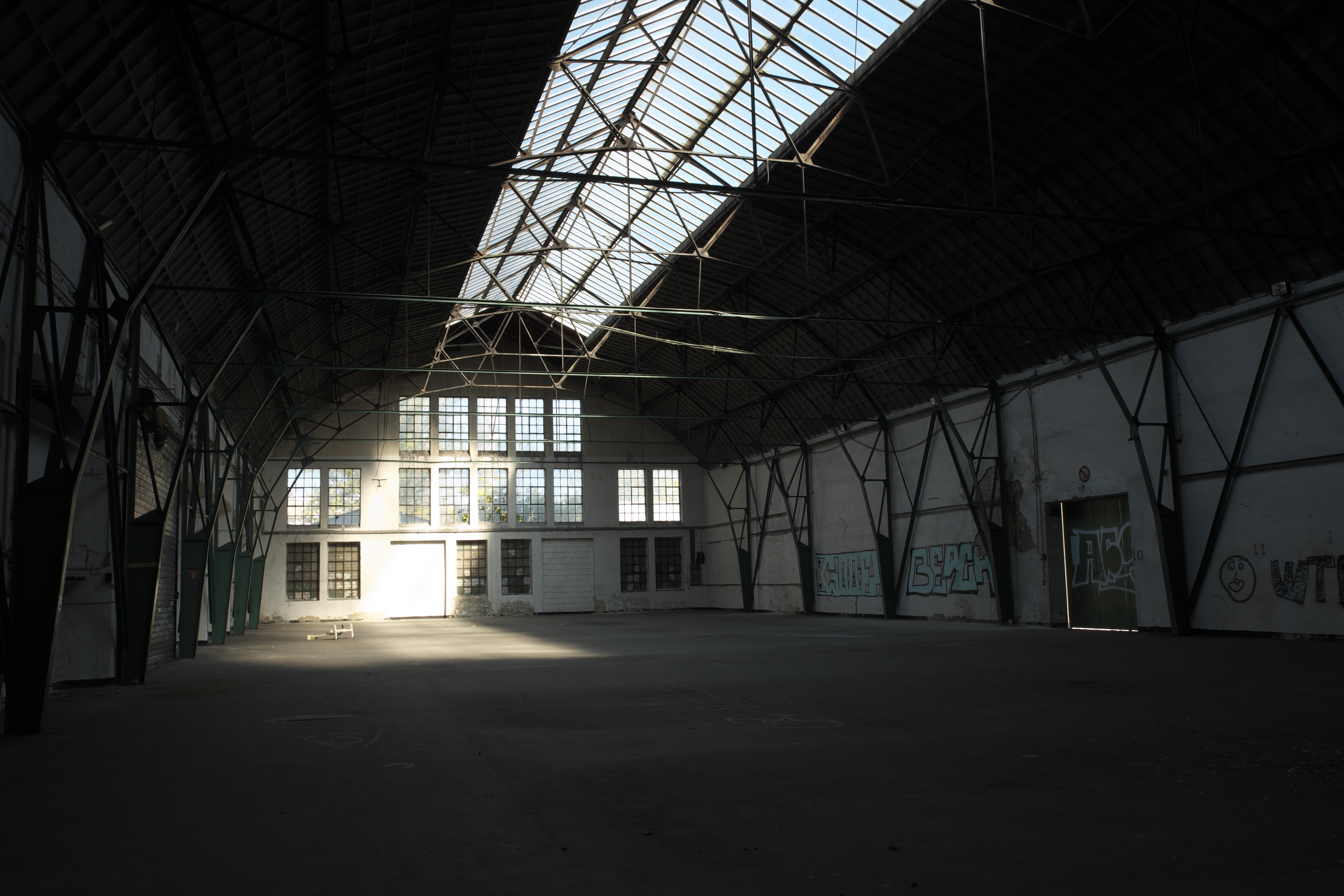 Fabrikhalle (Münchener Eggenfabrik) in Pasing im Stadtbezirk Pasing-Obermenzing in München (Bayern/Deutschland)